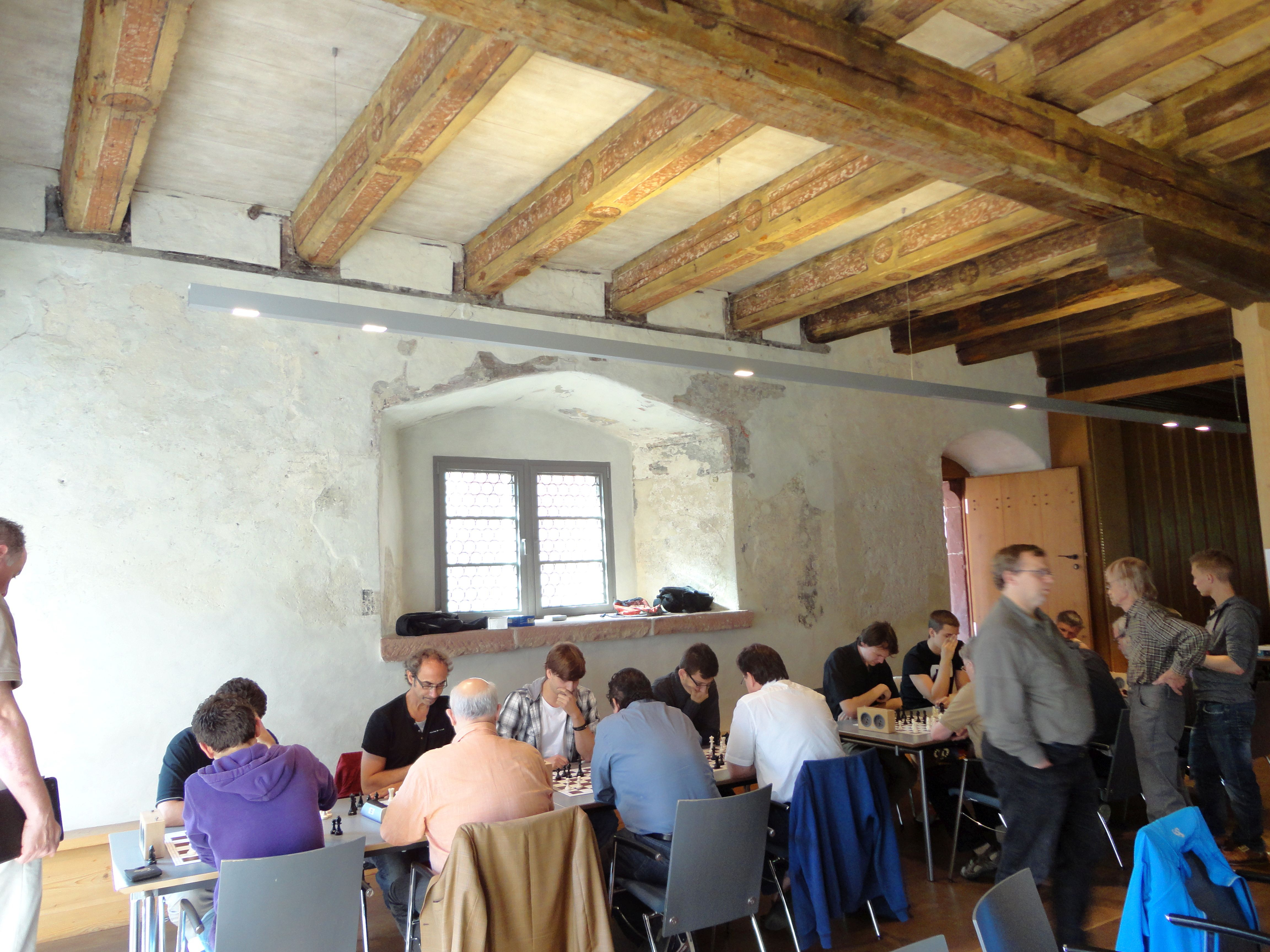 Die Große Stube in der Talvogtei in Kirchzarten, während der Blitzmeisterschaften 2014 im Schach des Bezirkes Freiburg